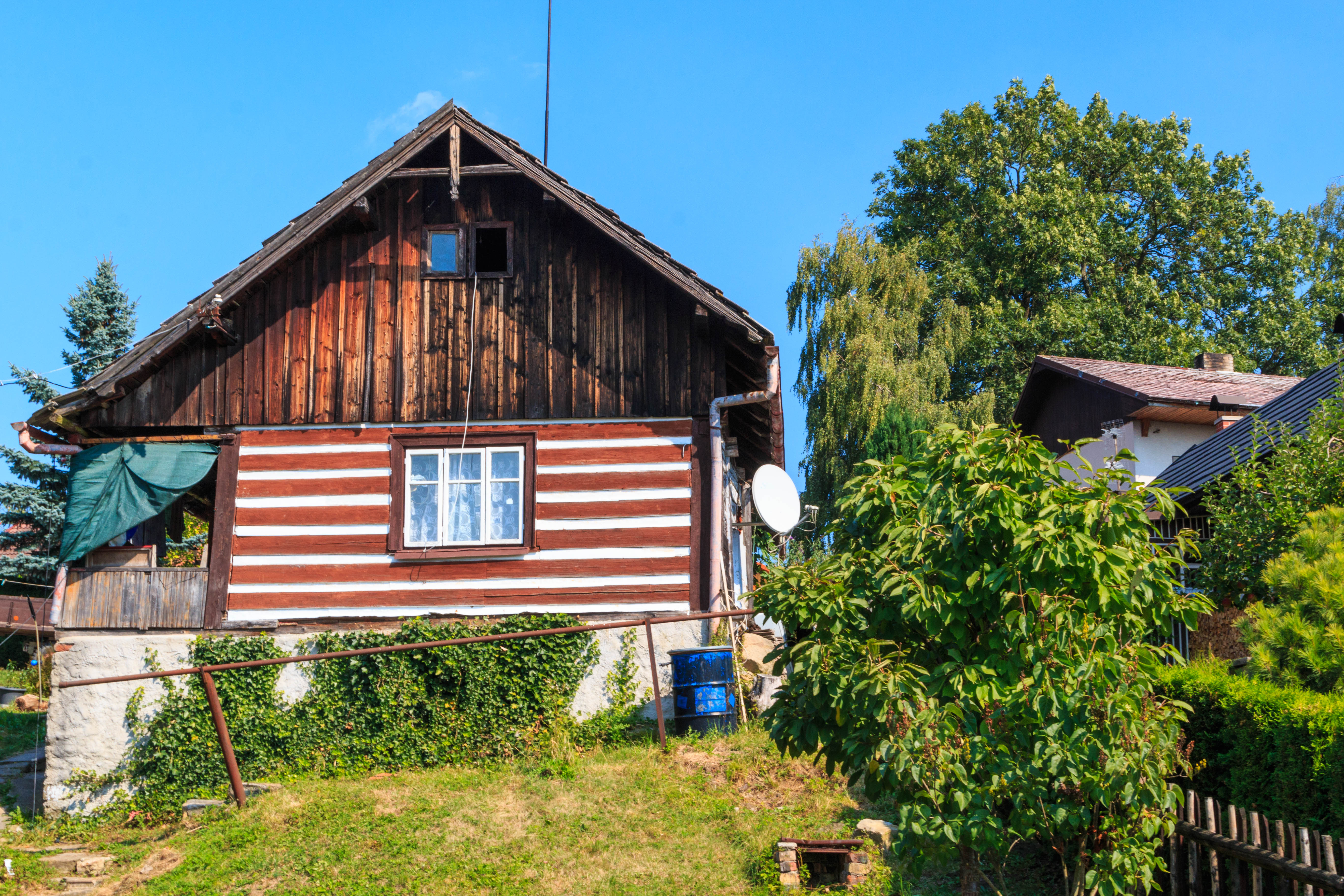 Střeleč - čp. 7